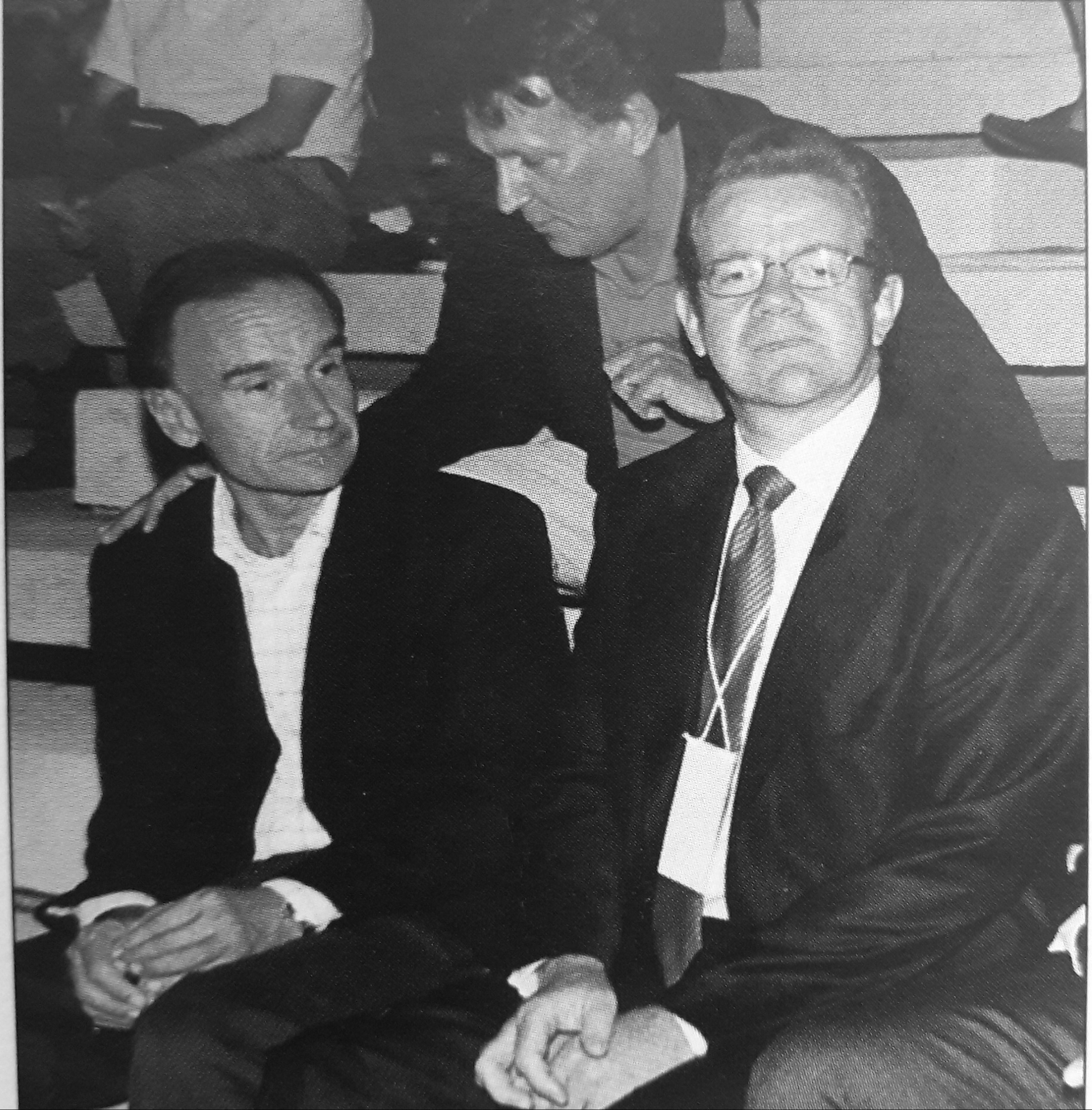 Con Gianni De Magistris , il Presidente del C.O.N.I. Gianni Petrucci e il Commissario F.I.N. Avvocato Aurelio Vessichelli